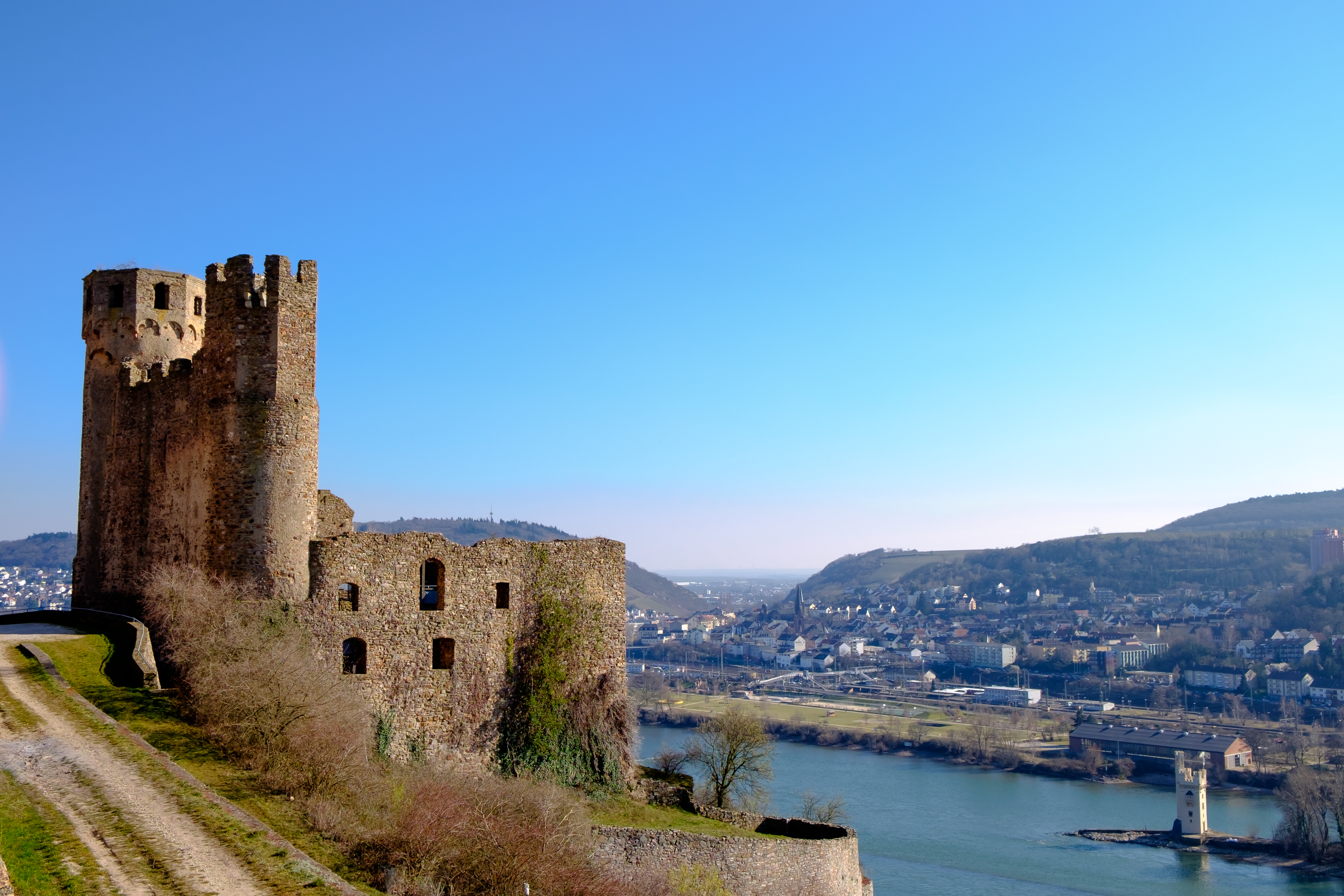 Burg Ehrenfels bei Rüdesheim, im Hintergrund Mäuseturm